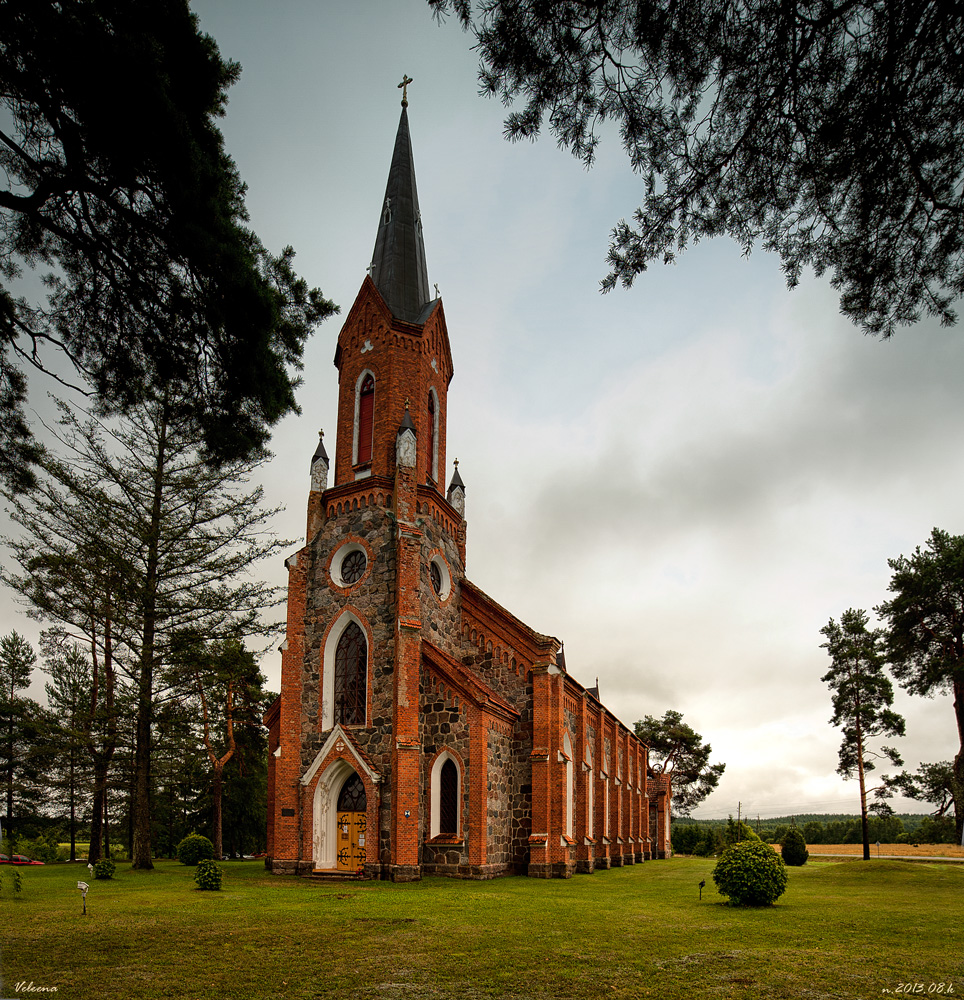 Velēnas luterāņu baznīca, Velēna